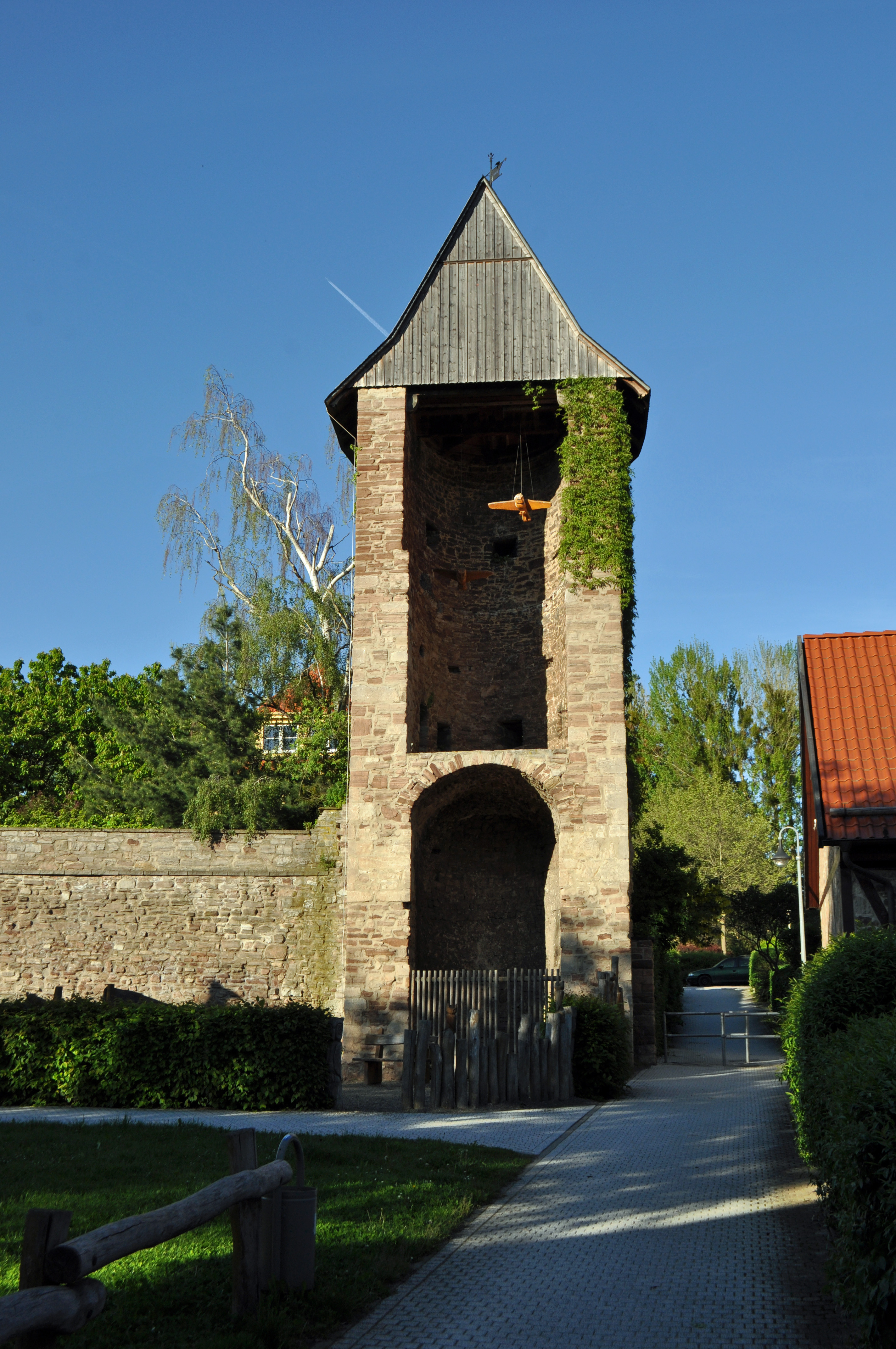 Stadtbefestigung